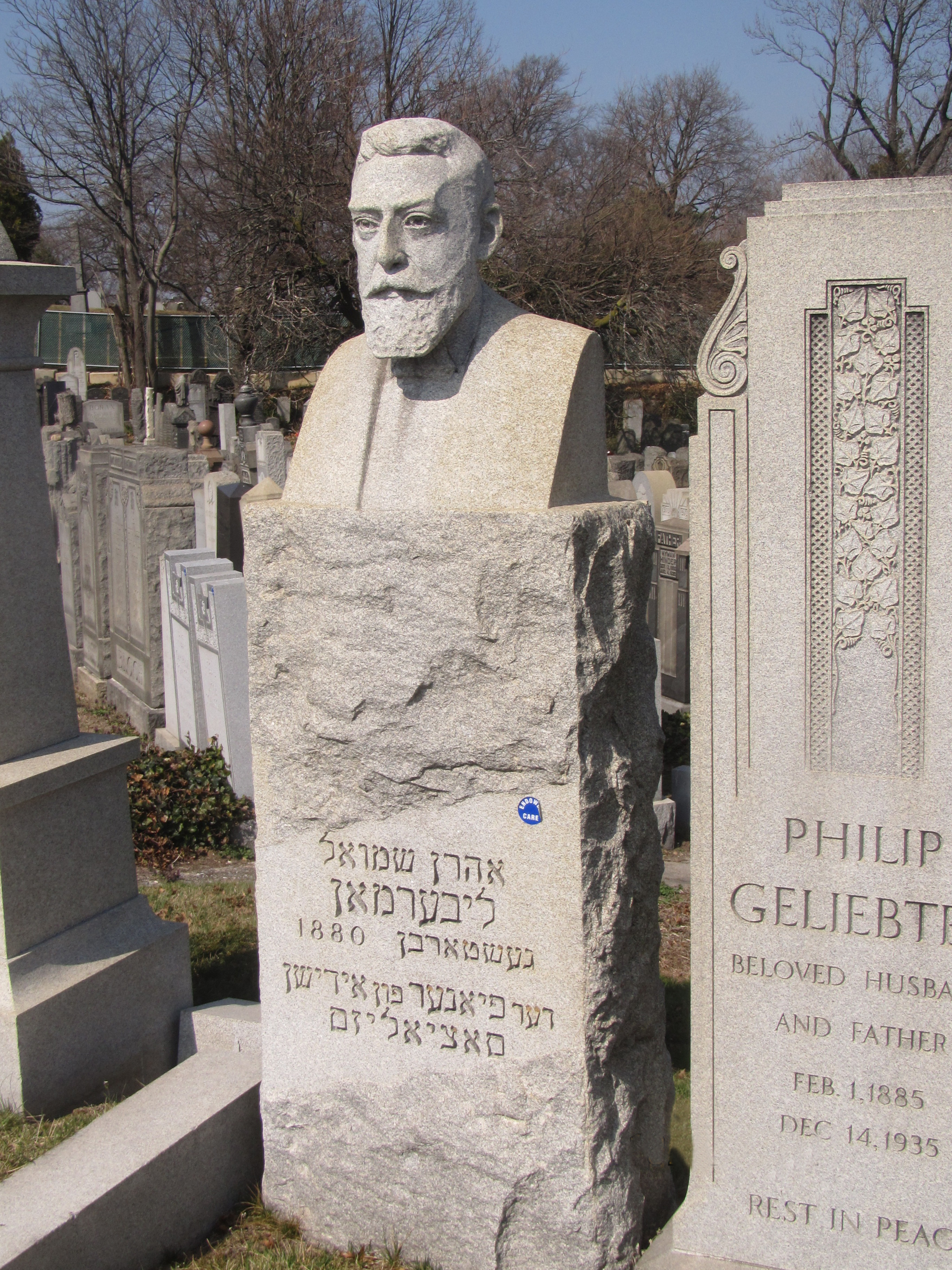 מצבתו של אהרן שמואל ליברמן בבית קברות בניו יורק